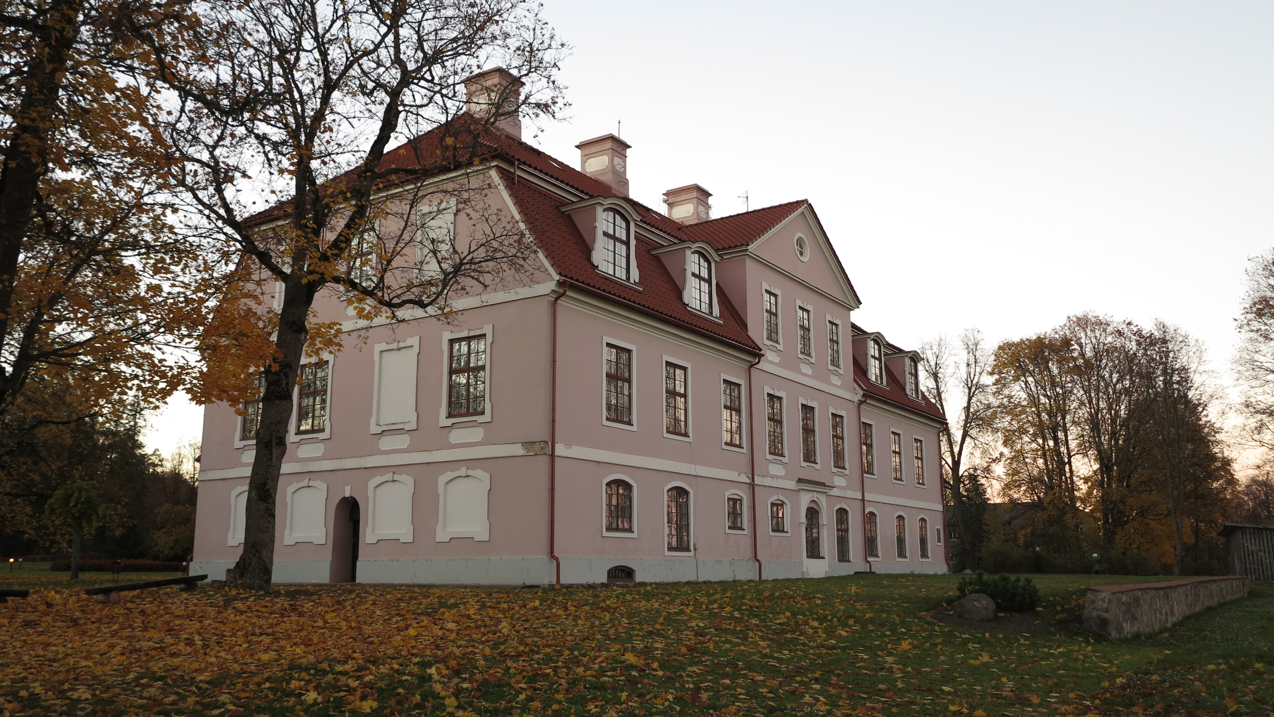 Dzelzava mõisa peahoone 2015. aastal.